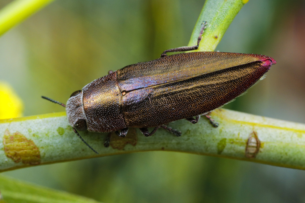 Melobasis nudipectus